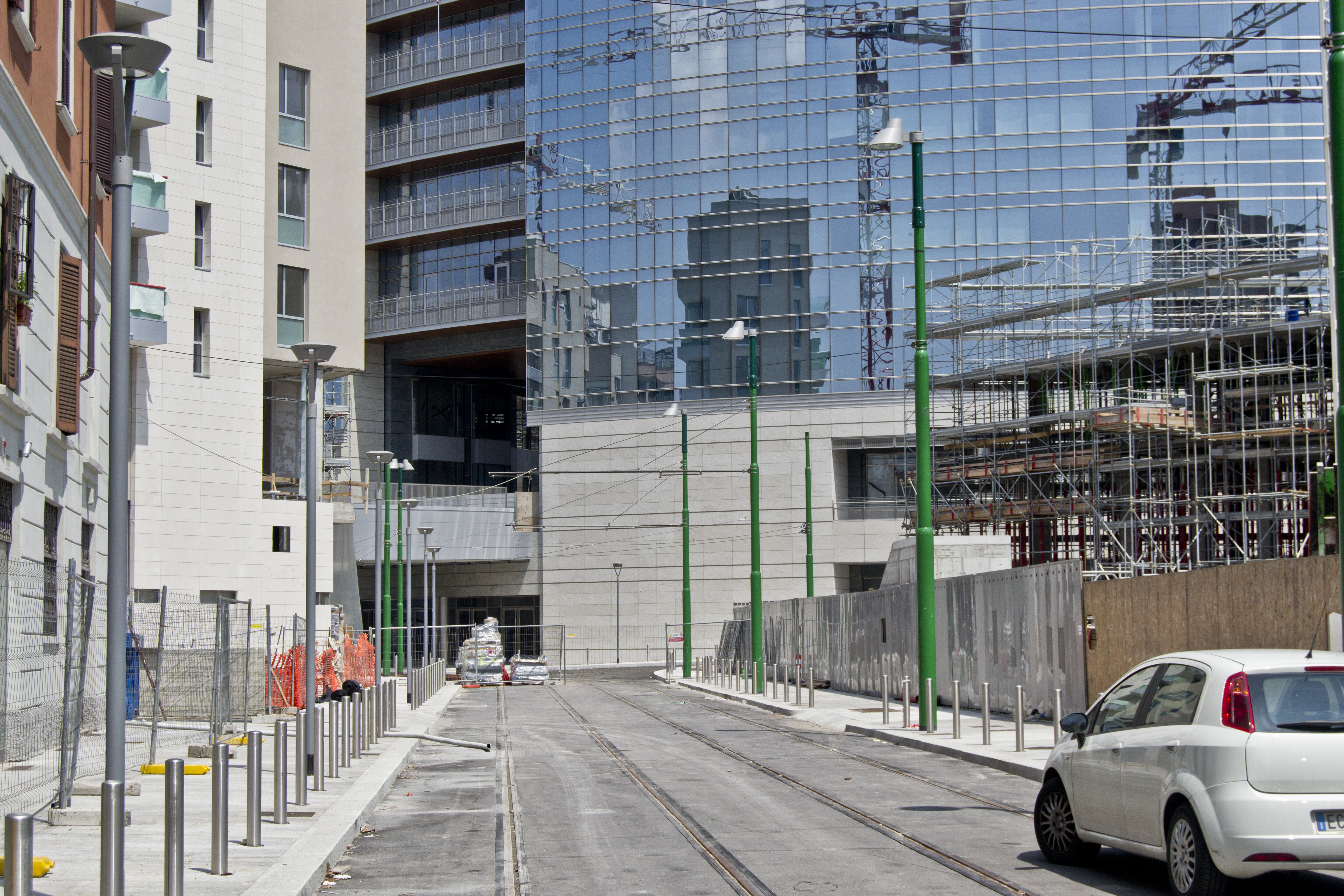 Il nuovo tracciato del tram in via Rosales, Milano